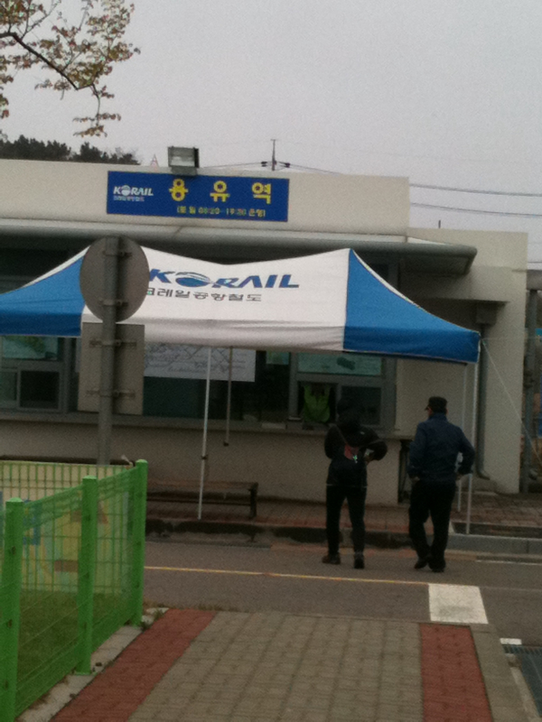 용유역 역 건물.